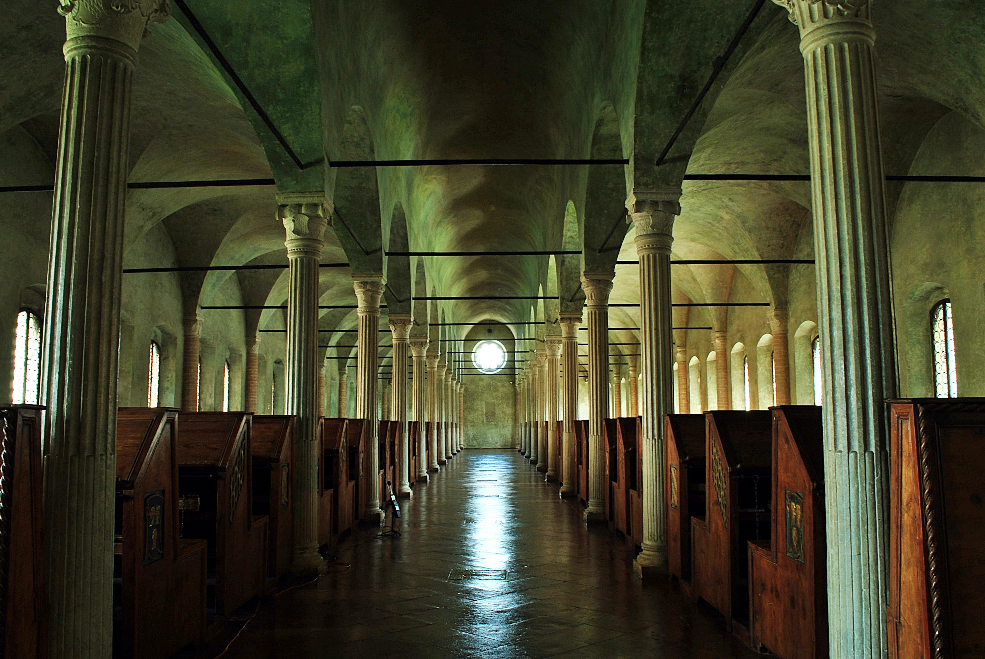 L'Aula del Nuti si trova all'interno della Bibliotaca Malatestiana, patromonio UNESCO Registro della Memoria del Mondo, prima biblioteca civica d'Italia e d'Europa unico esempio di biblioteca monastica umanistica giunta fino a noi perfettamente conservata nell'edificio, negli arredi e nella dotazione libraria. Domenico Malatesta, al tempo signore di Cesena affidò il compito di progettare l'opera all' architetto fanese Matteo Nuti che la terminò nel 1452. Lungo le due navate laterali, le meglio illuminate, sono disposti i 58 banchi (plutei), 29 per fila nei quali si conservano i codici. La navata centrale, quella stretta e rialzata, funge invece da corridoio. Si tratta di una soluzione razionale che avrebbe fatto scuola nelle biblioteche monastiche dell'Italia settentrionale. This is a photo of a monument which is part of cultural heritage of Italy.